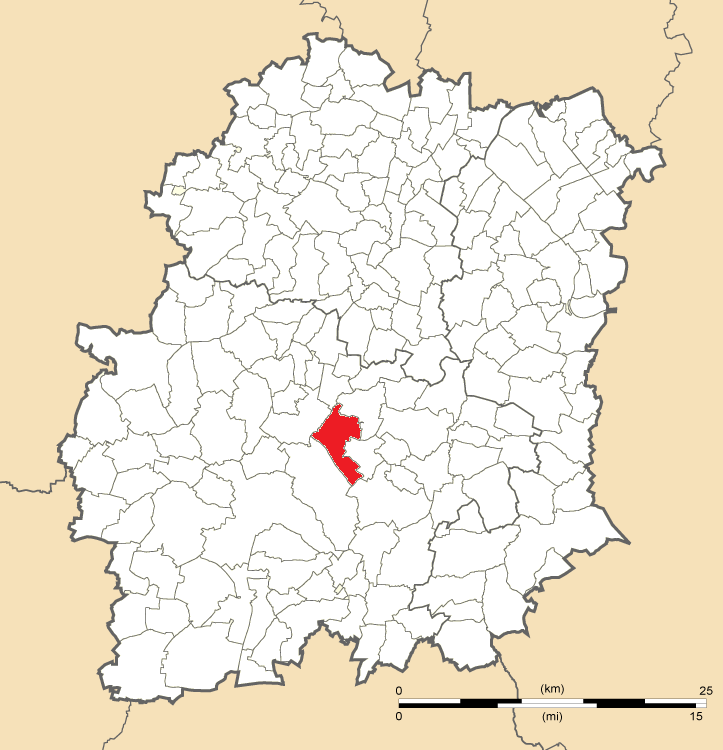 Carte de position d'Auvers-Saint-Georges en Essonne (91)